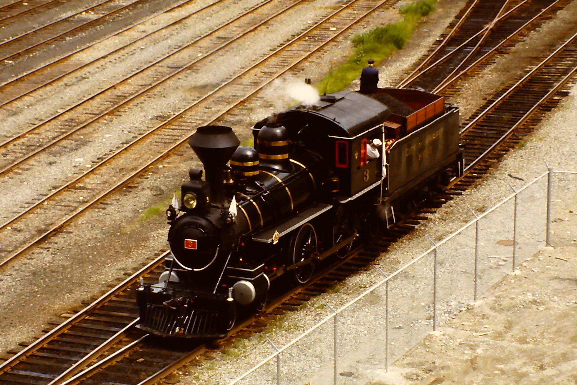 Nummer 3 der Prairie Dog Railway, ex Canadian Pacific und City of Winnipeg Hydro auf der SteamExpo 86 (Parade)